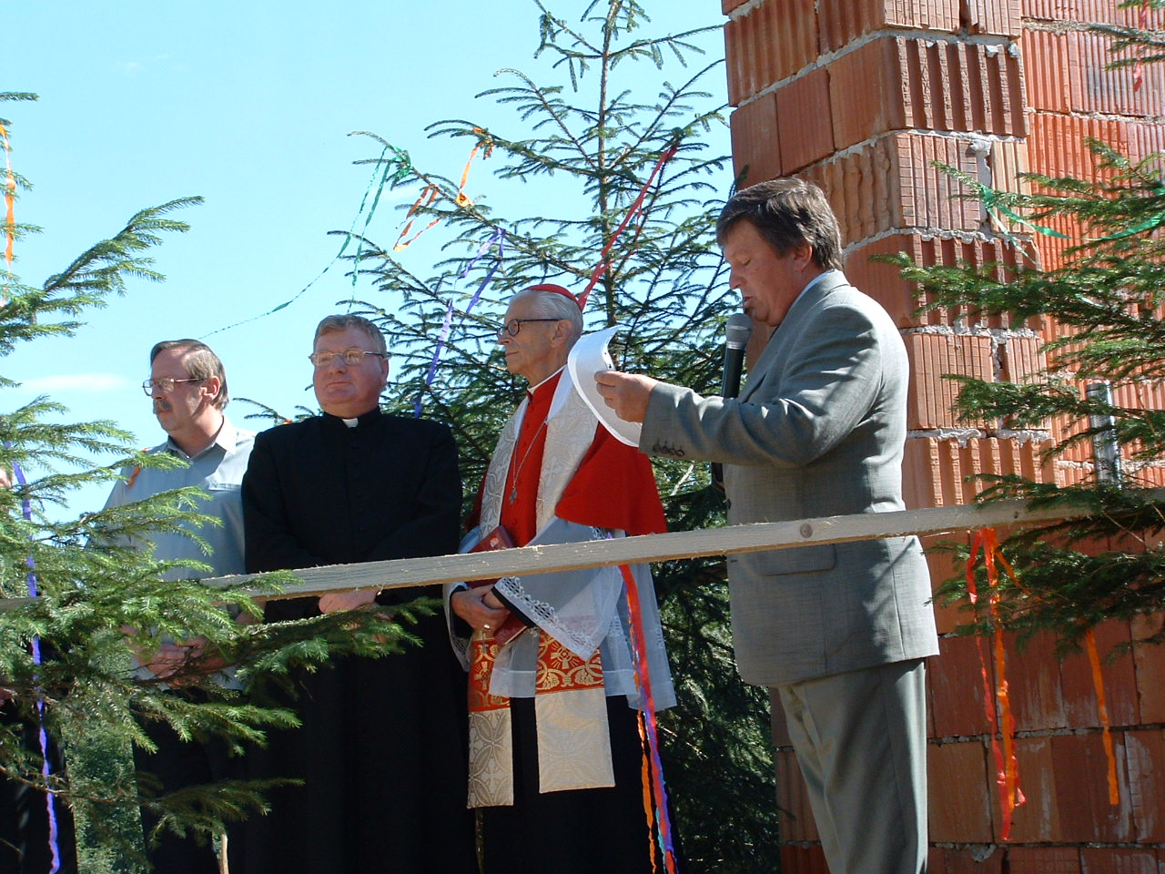 Wbudowanie aktu erekcyjnego pod budujące się Gimnazjum w Leśnicy z udziałem kard. Franciszka Macharskiego.